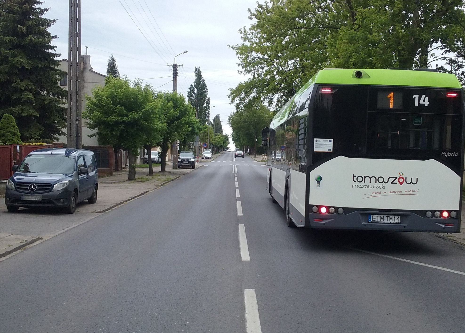 Ulica Józefa „Montwiła” Mireckiego w Tomaszowie Mazowieckim